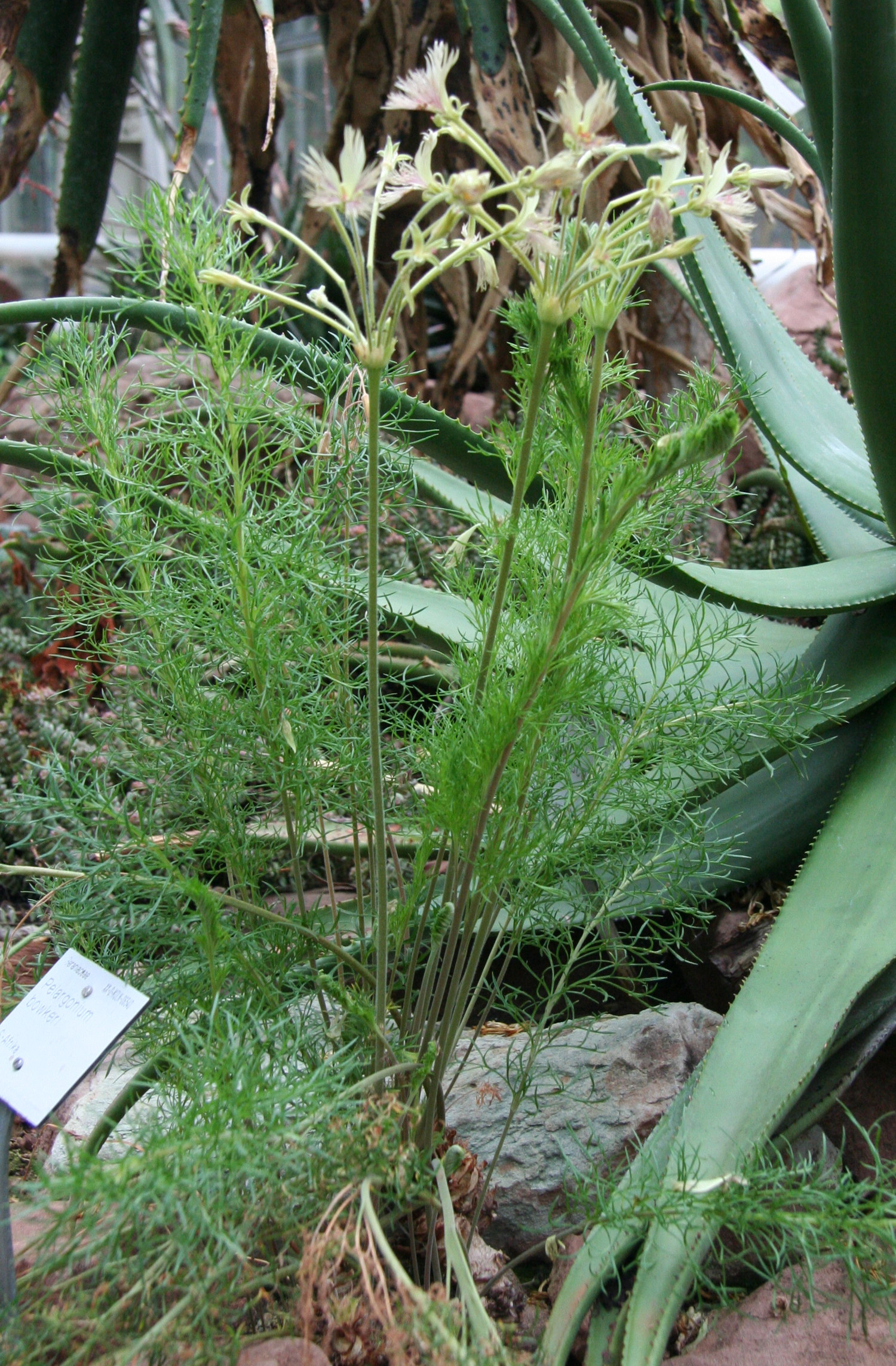 Pelargonium bowkeri im Botanischen Garten Köln